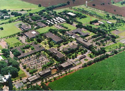 Polis de Tecnologia, Campinas, Brazil